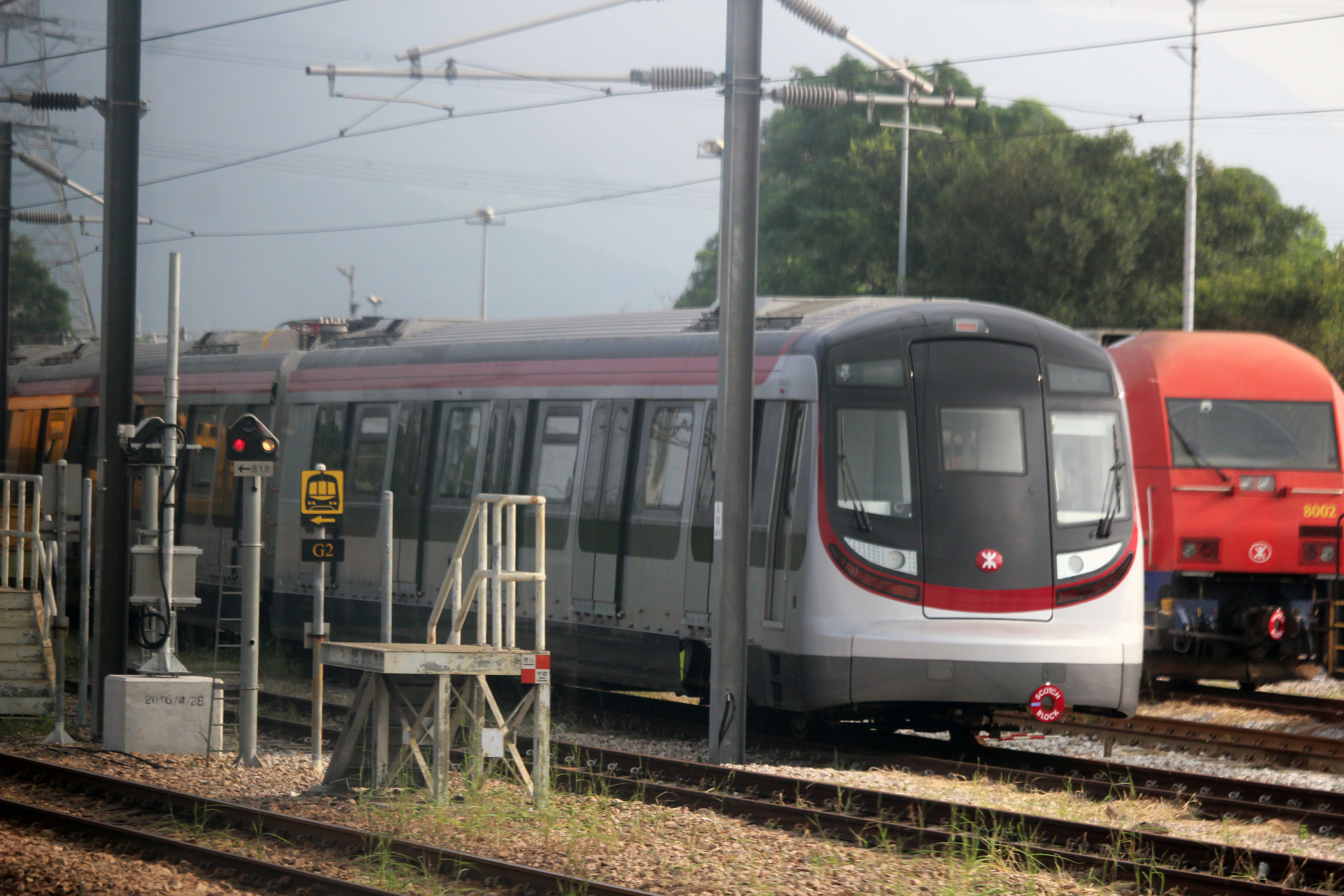 港鐵第二列現代列車停放在羅湖編組站